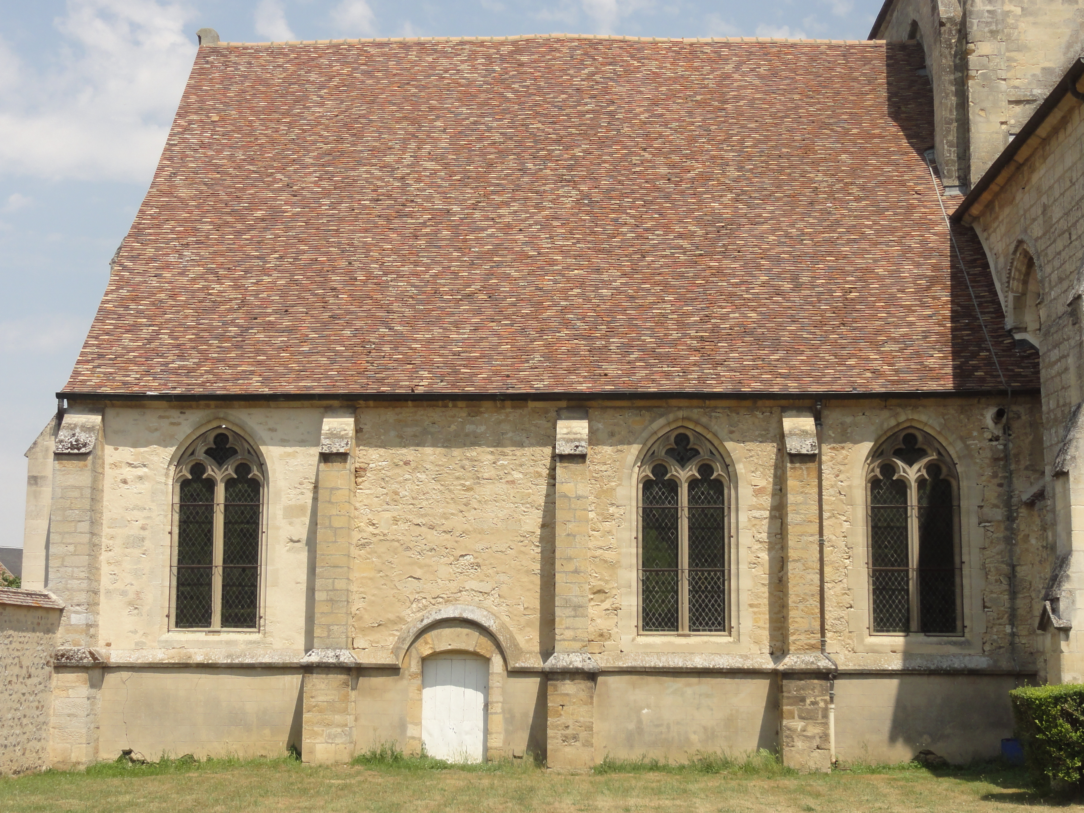 Église Saint-Lucien d'Avernes (voir titre).